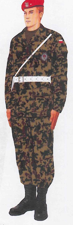 Mundur służbowy ŻW